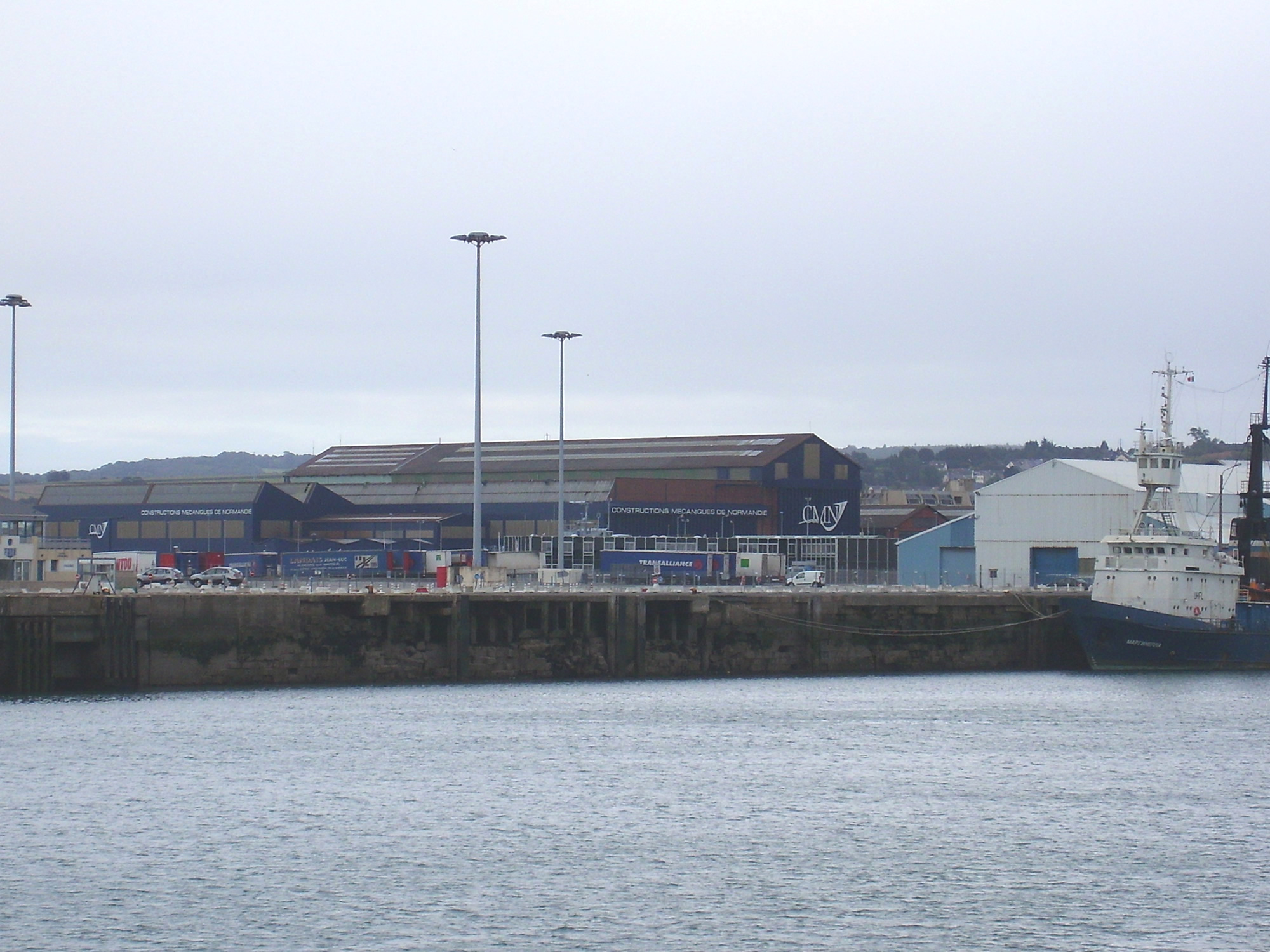 Ateliers des Constructions mécaniques de Normandie (CMN), à Cherbourg-Octeville